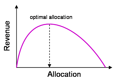 Revenue per allocation